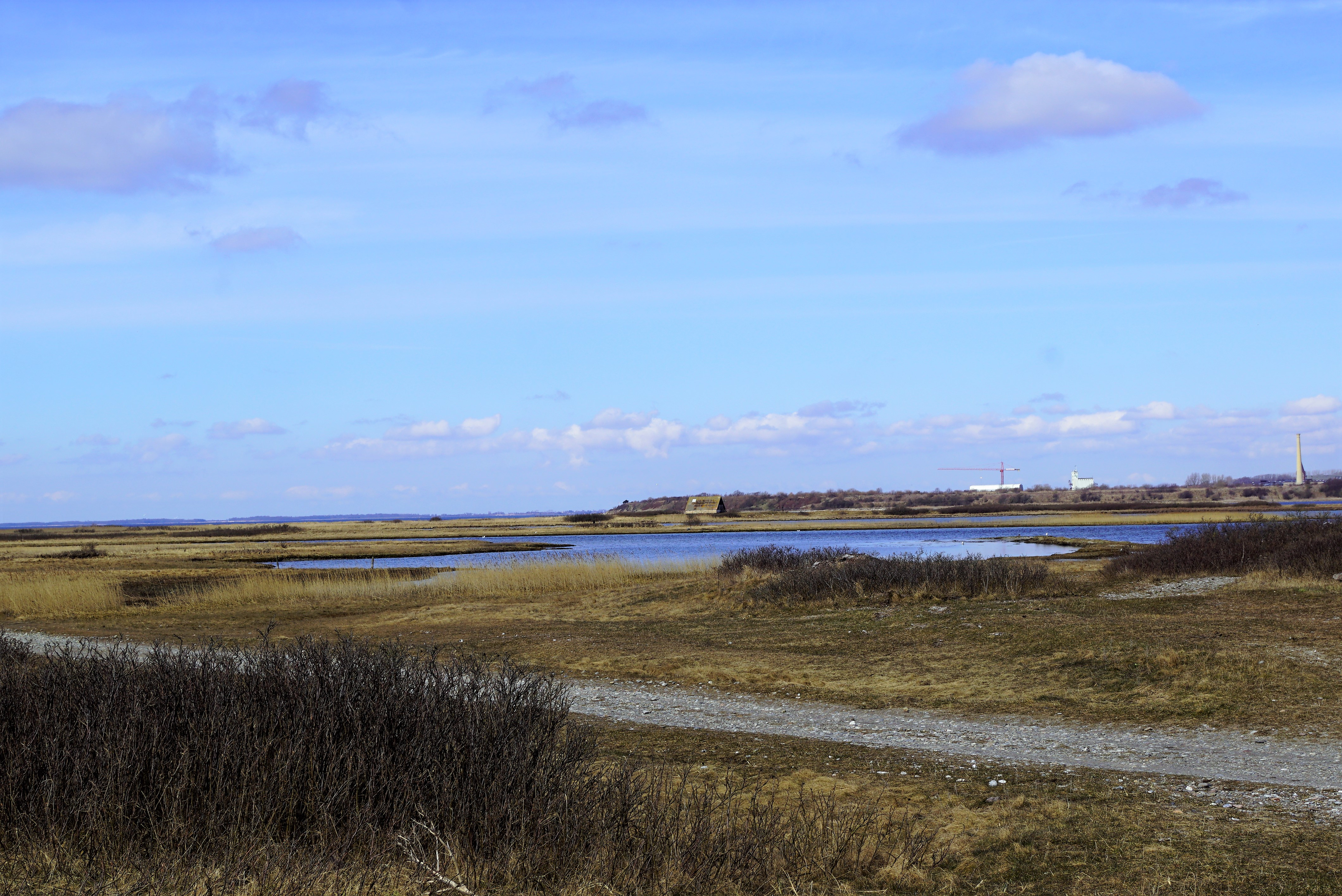 Torø set mod nord